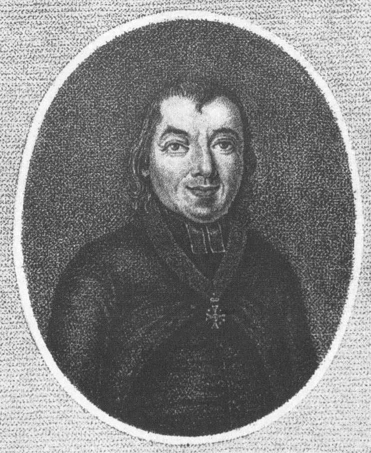 Ignaz-Pickel-Portrait, vor 1810